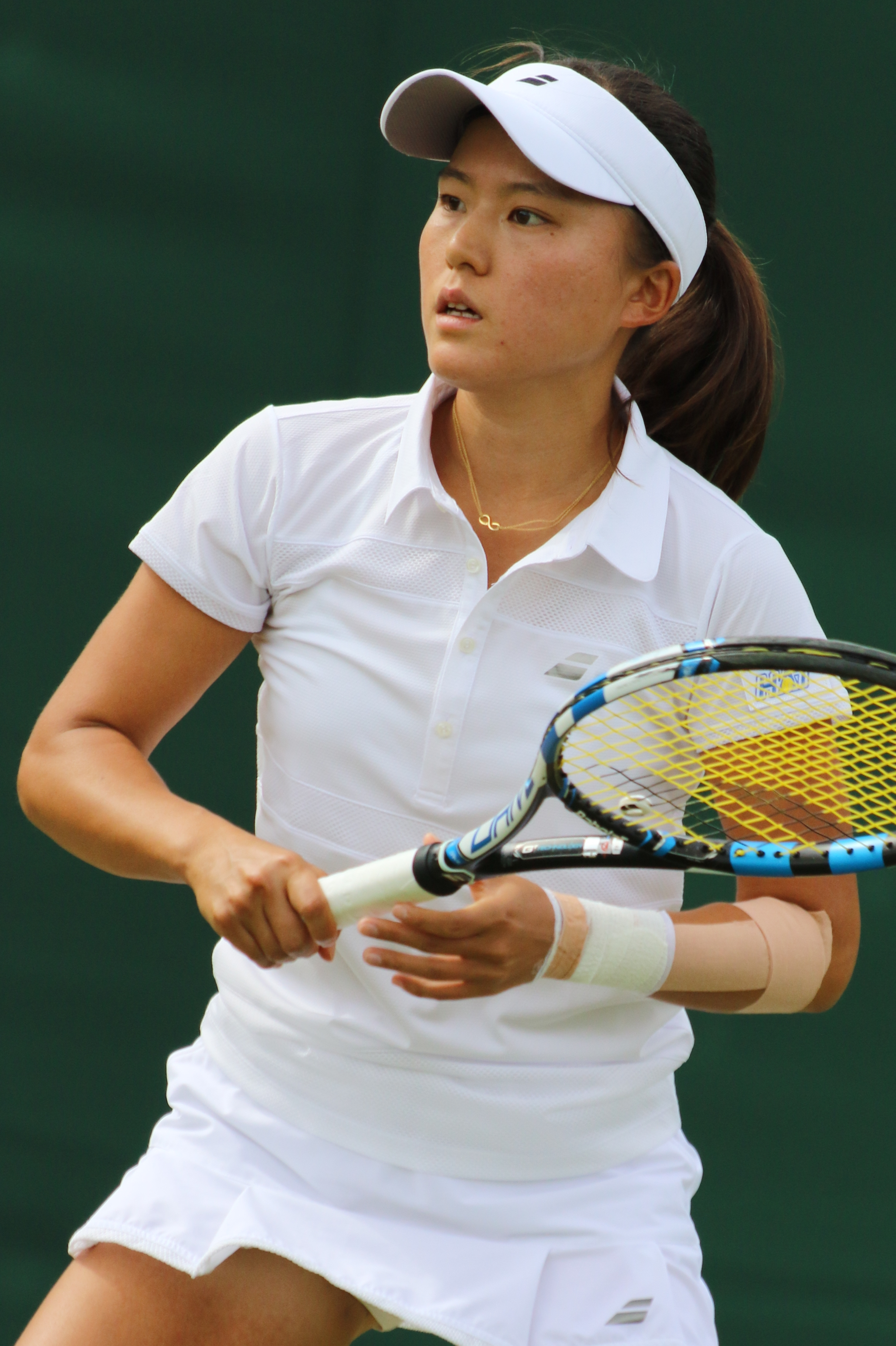 Ninomiya WM17 (1)